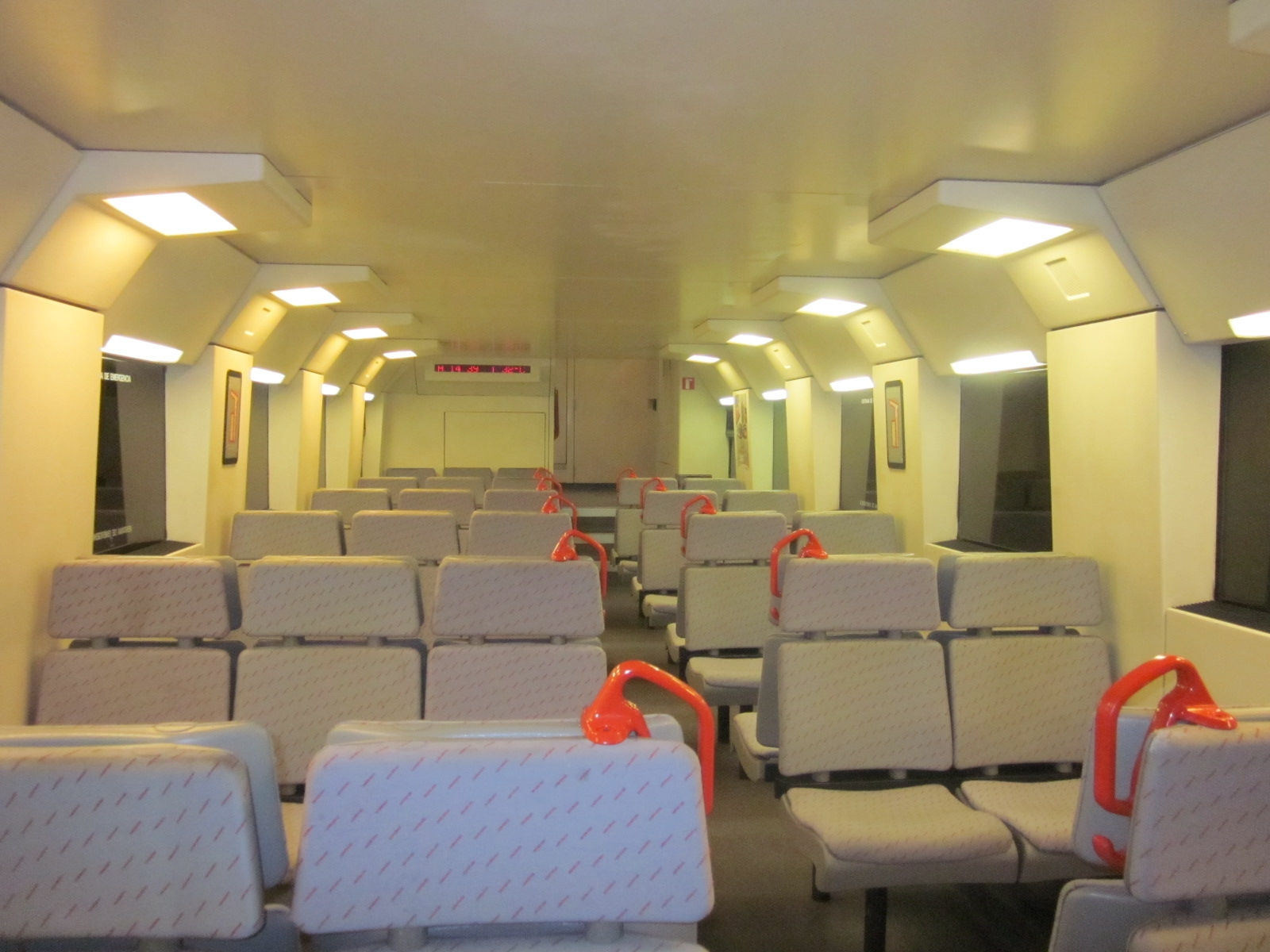 Interior d'un tren de la sèrie 450 de Renfe (pis inferior), en servei a la R-2 de Rodalies Barcelona.